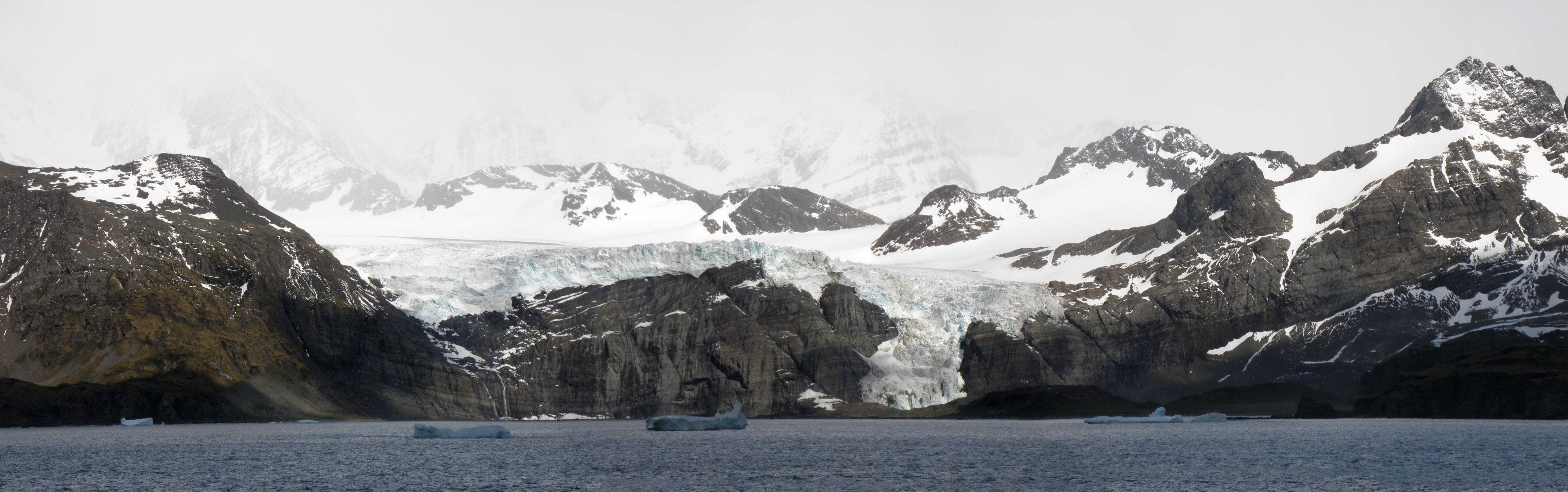 Géorgie du Sud - Gold Harbour - Vue panoramique de la baie